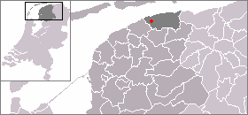 Locatie van Waaxens, zelf gemaakt uit sjabloon van Wikipedia-gebruiker Mtcv